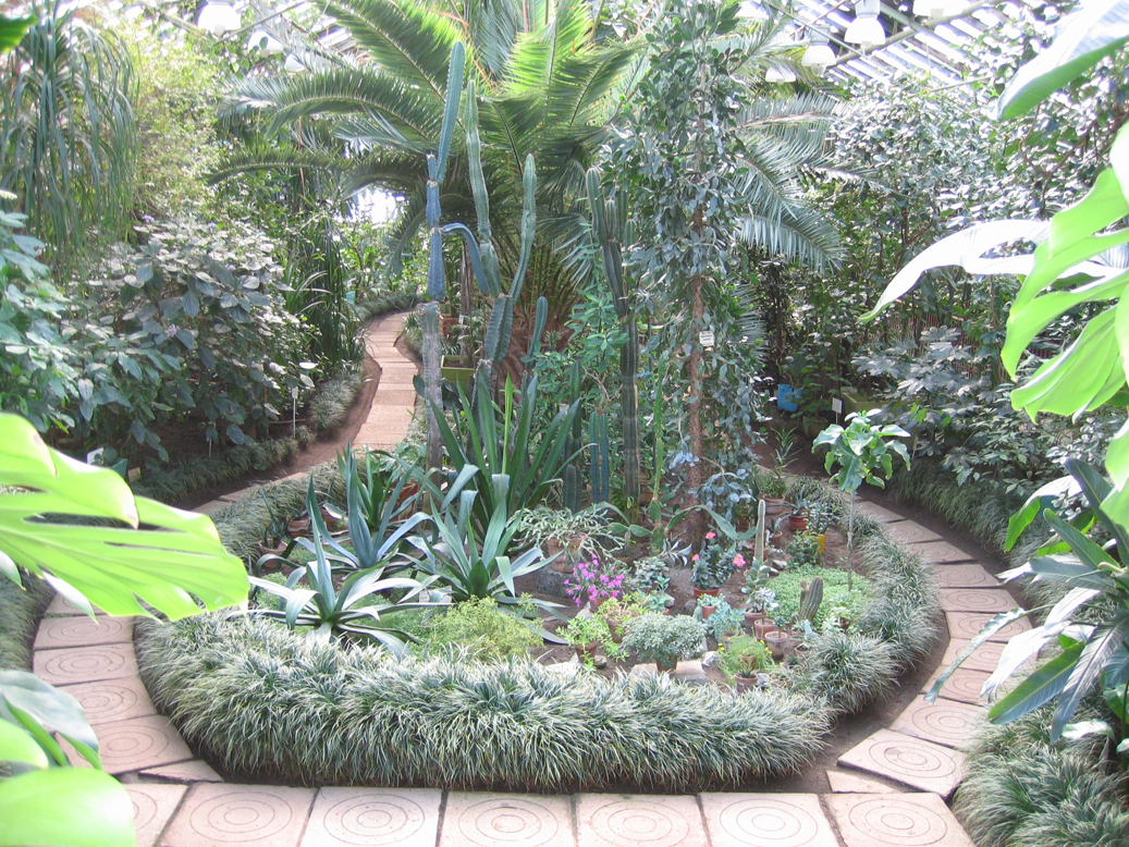 Botanical Garden - Kirovsk